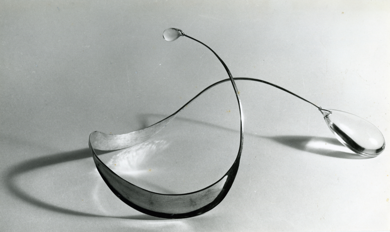 Servizio fotografico : Italia, 1958 / Paolo Monti. - Stampe: 6 : Positivo b/n, gelatina bromuro d'argento/ carta, 24x30. - ((Al verso delle stampe iscrizioni didascaliche e documentarie (date) manoscritte a matita: "Couverts dessinés par l'Arch. Giò Ponti Milan/ 1958"; "Gioiello di Hilde Strömer/ 1958"; iscrizioni didascaliche manoscritte a pennarello su striscia adesiva in carta bianca; timbro a inchiostro con copyright (Corso Sempione - Milano). - Sul coperchio della scatola iscrizione didascalica manoscritta a pennarello nero: "Scultura". - Le stampe sono incollate a 2 a 2 con nastro adesivo trasparente.